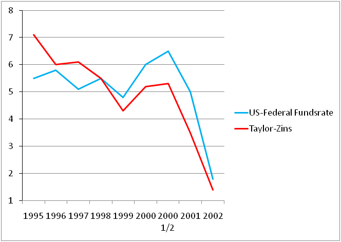 US-Federal Funds Rate und der Taylor Zins